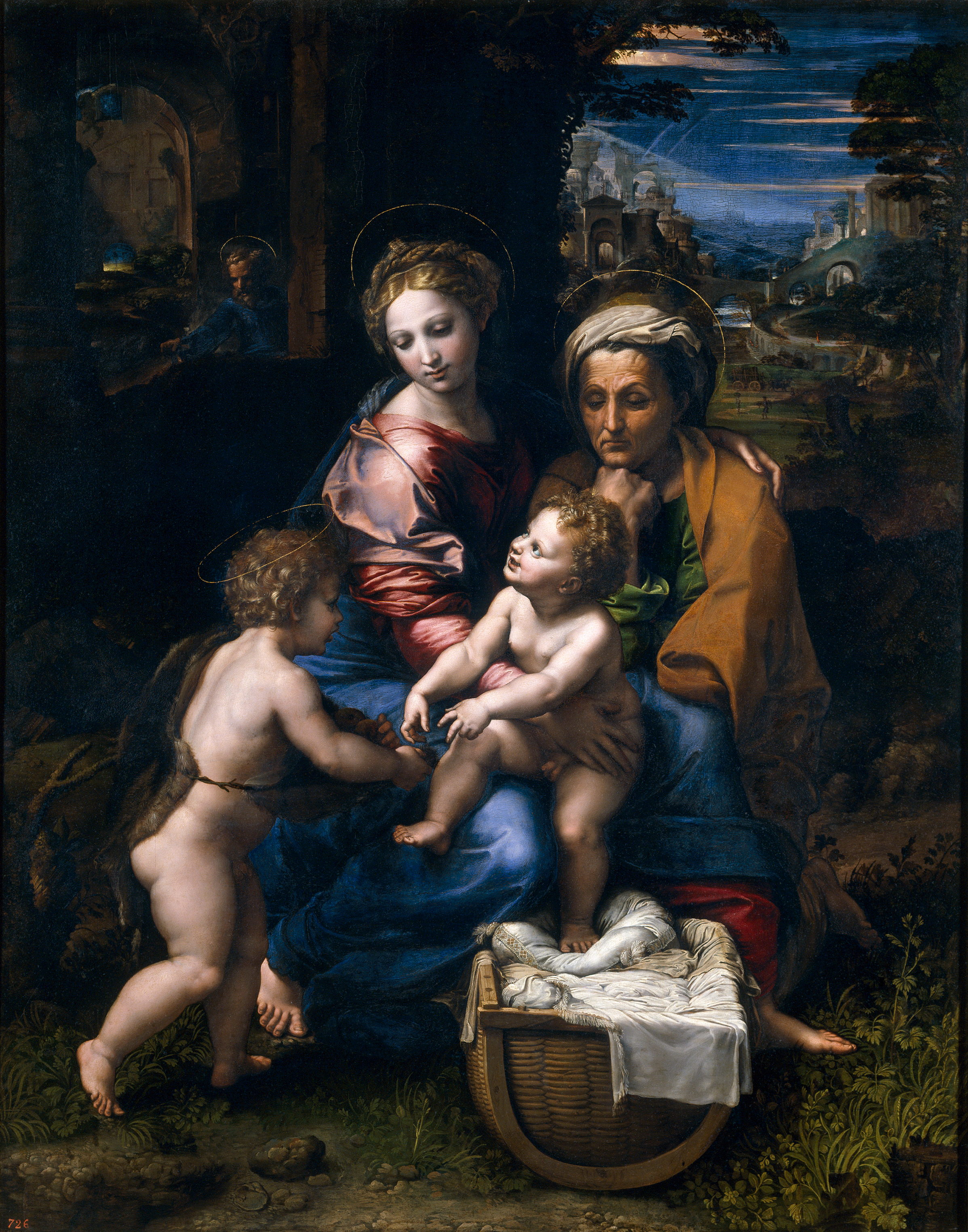 La Perla, Rafael e ateliê. Museu do Prado, Madrid.